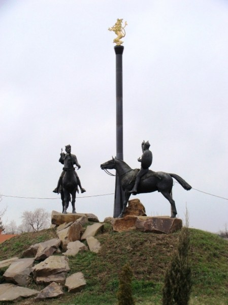 Nagykun millenniumi emlékmű, Karcag, 2001. Györfi Sándor alkotása.